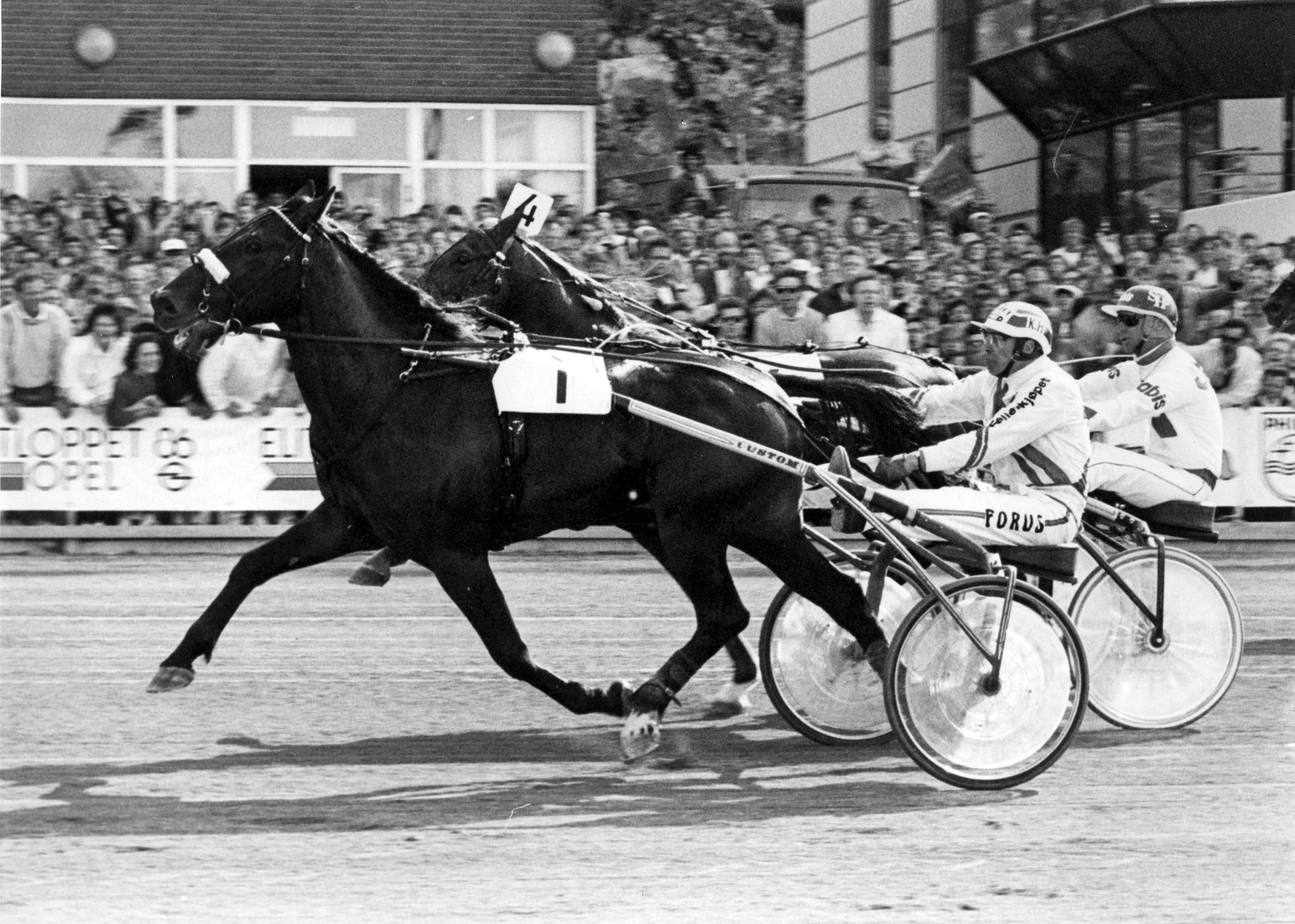 Rex Rodney og Kjell Håkonsen vinner Elitloppet, finalen. Solvalla 1986. Foto: Arild Hansen.